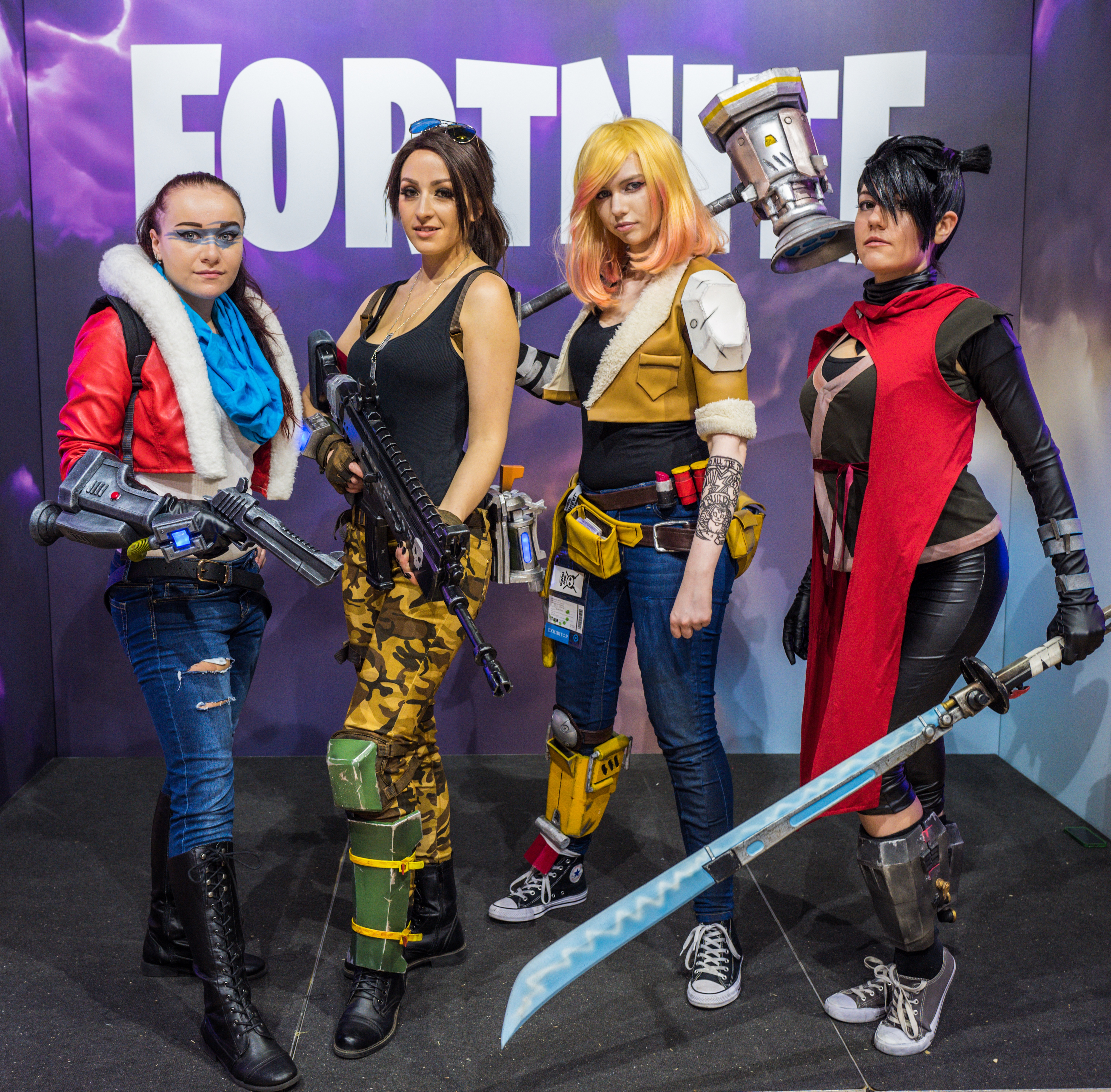 Gamescom 2017